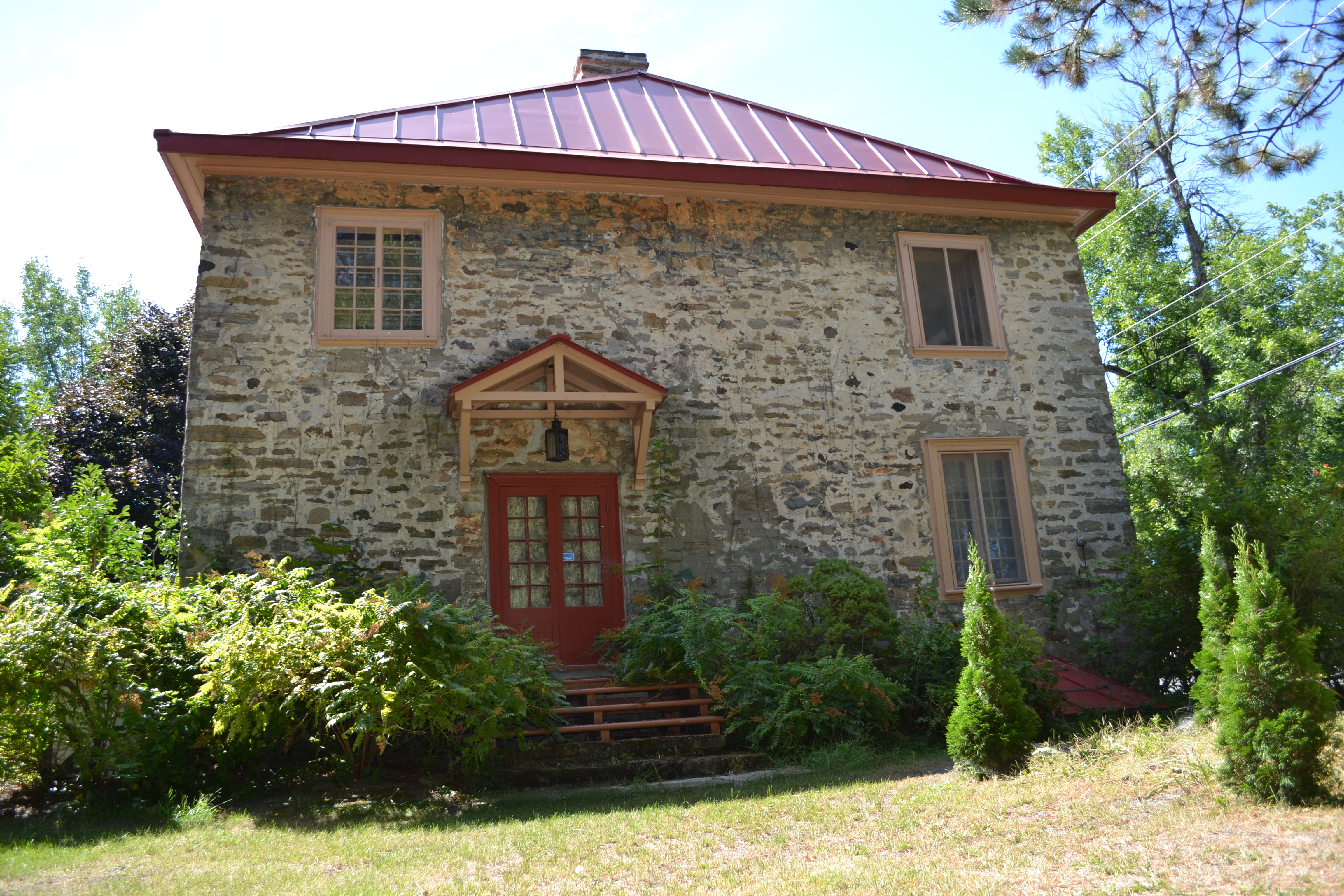 La maison Sauvageau-Sweeny est une résidence d'inspiration palladienne construite dans le premier quart du XIXe siècle.